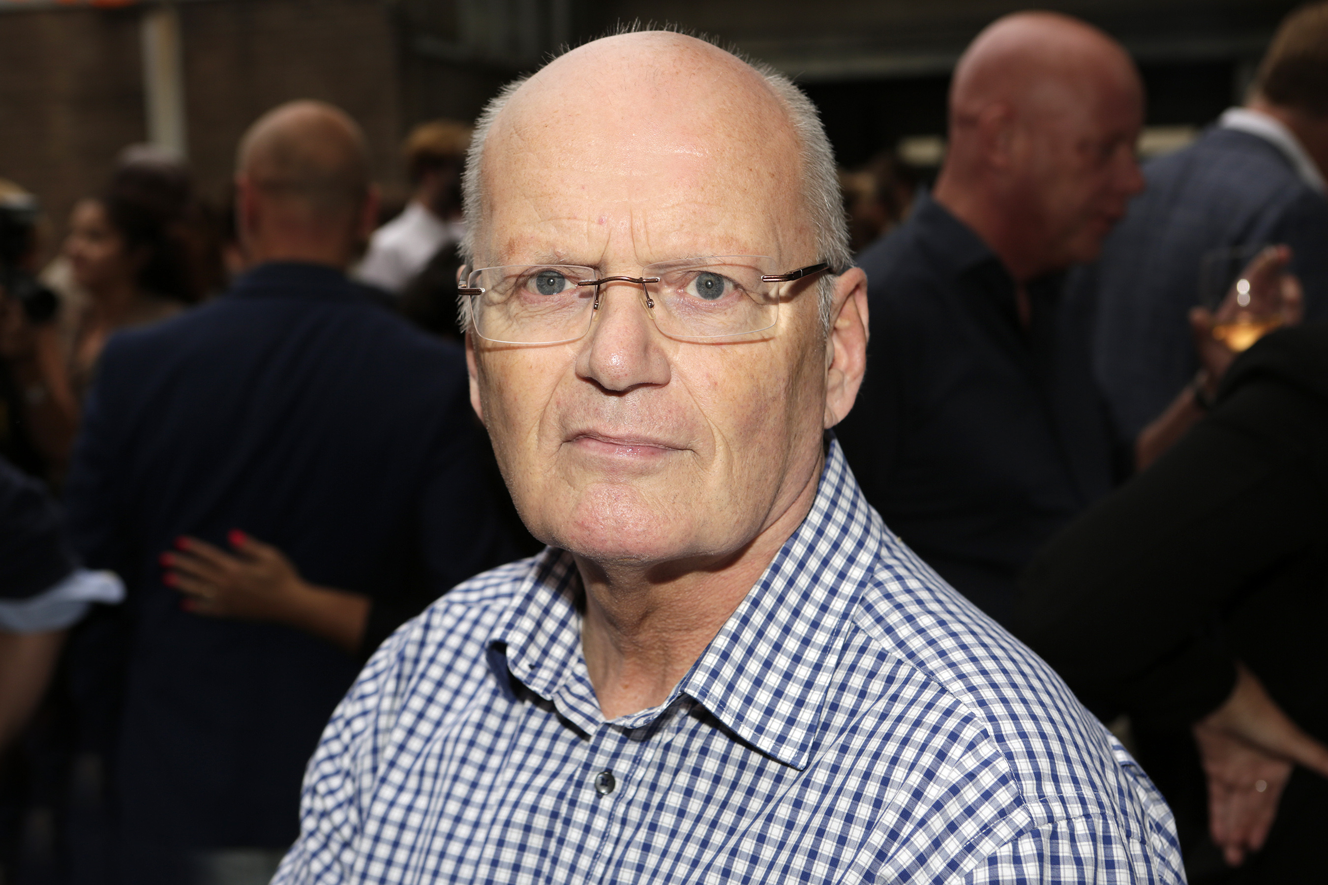 Ben Holthuis is nu werkzaam voor weekblad Privé